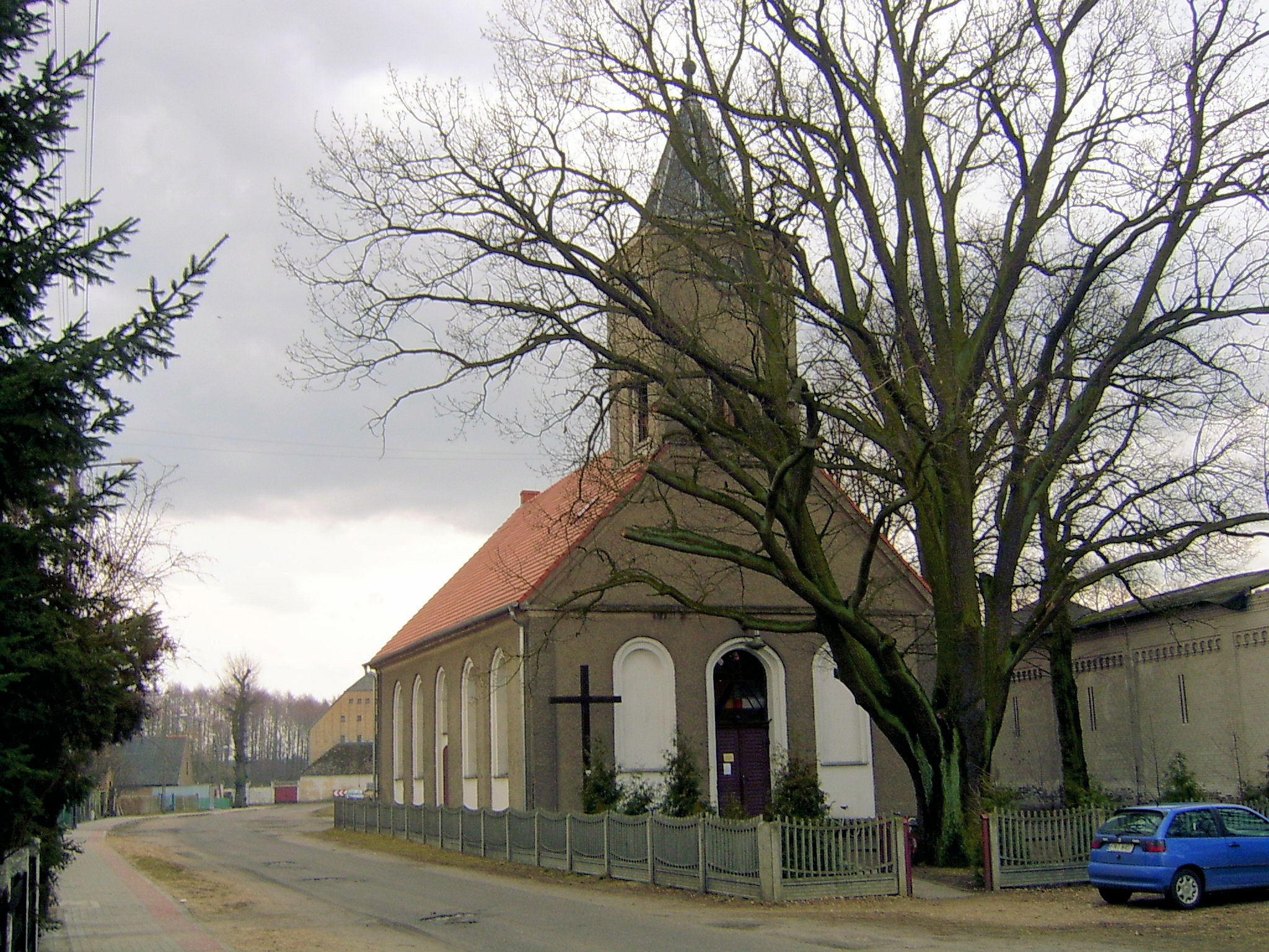 Murzynowo - dawny kościół ewangelicki, obecnie rzymskokatolicki p.w. Niepokalanego Serca Marii, 1 poł. XIX